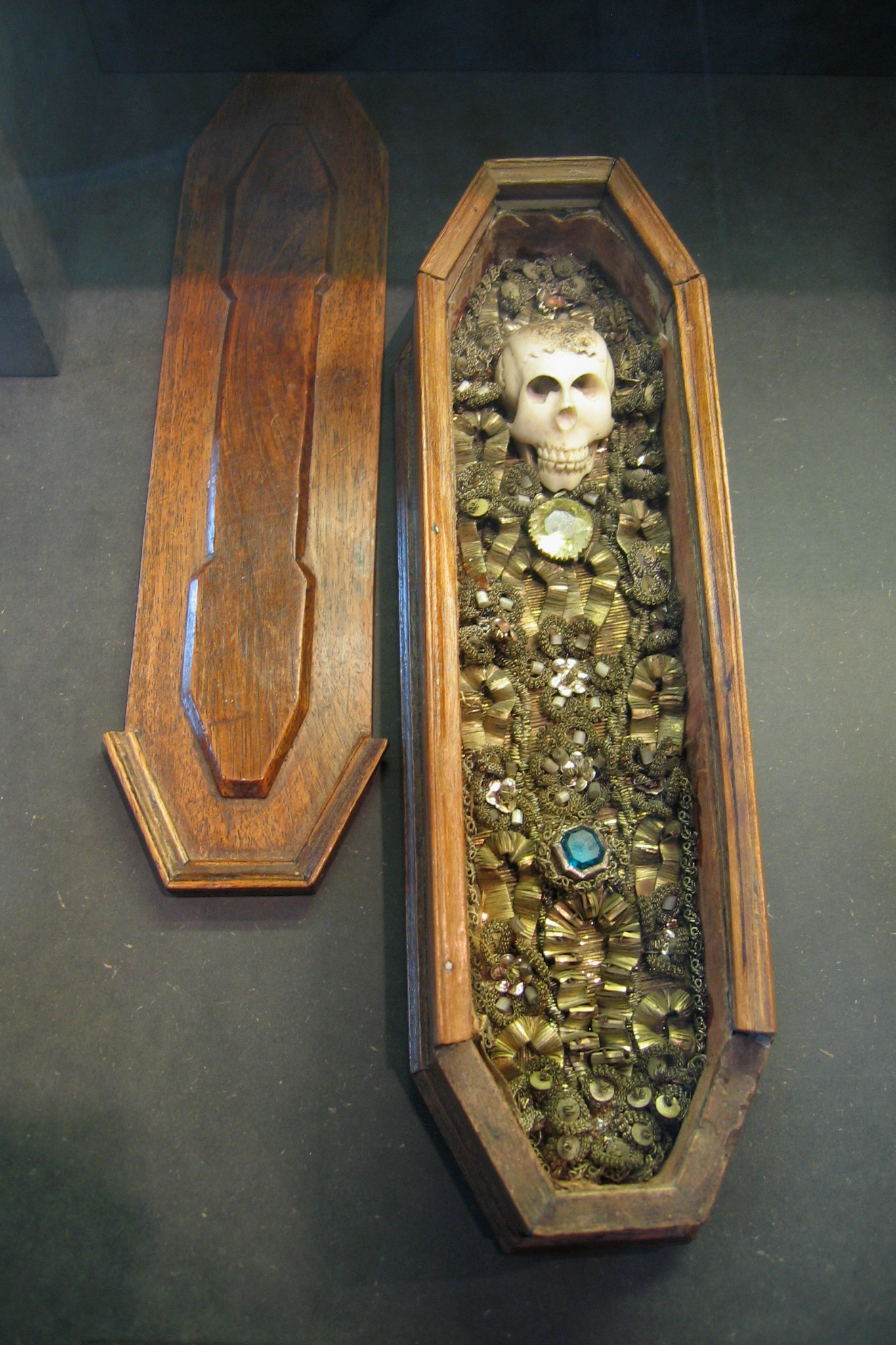 Aufwändiges Betrachtungssärglein. 18./19. Jahrhundert. Museum für Sepulkralkultur, Kassel, Deutschland.